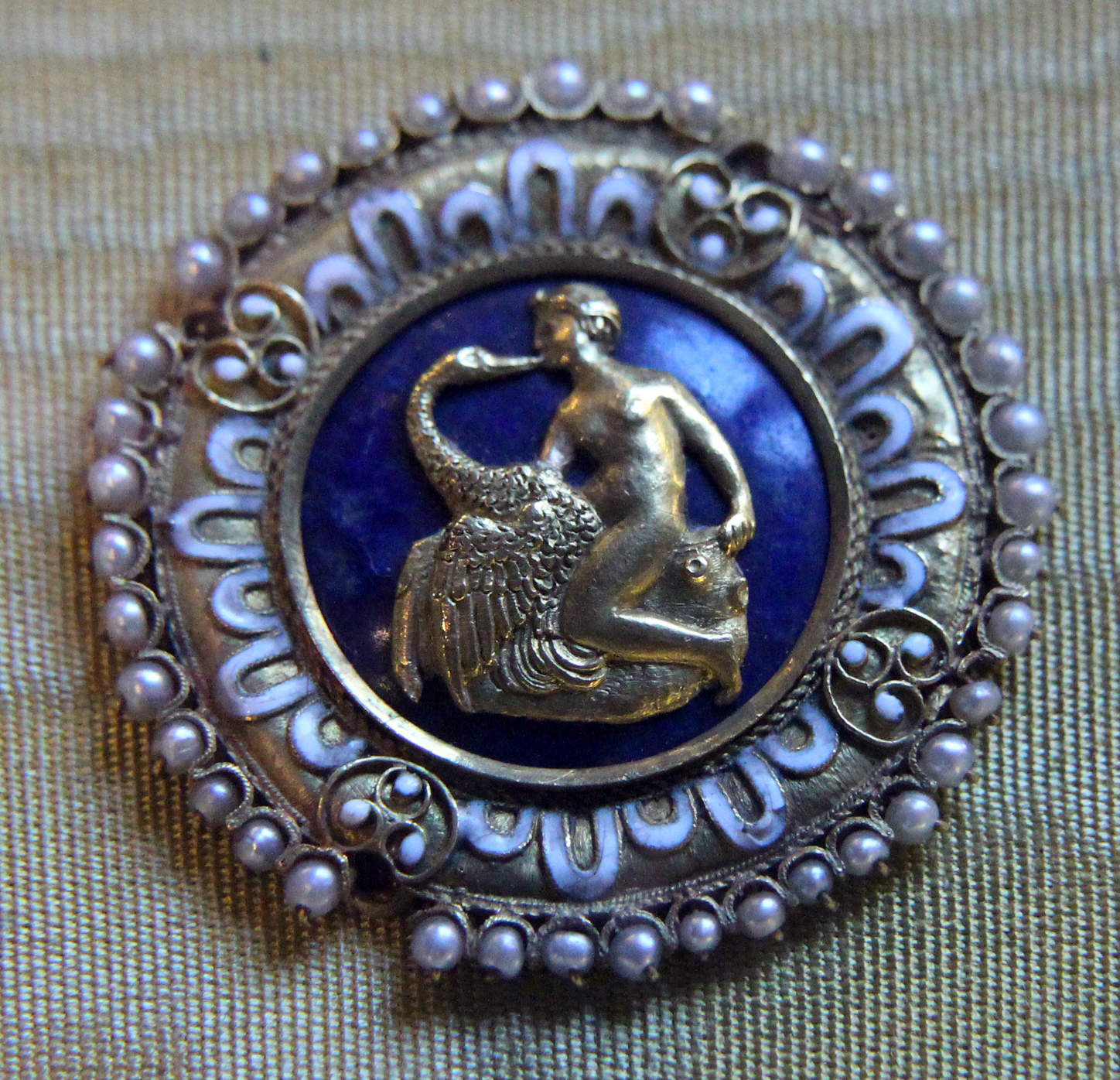 Bernardino poccetti, nozze di cana, 1604, 01.JPG